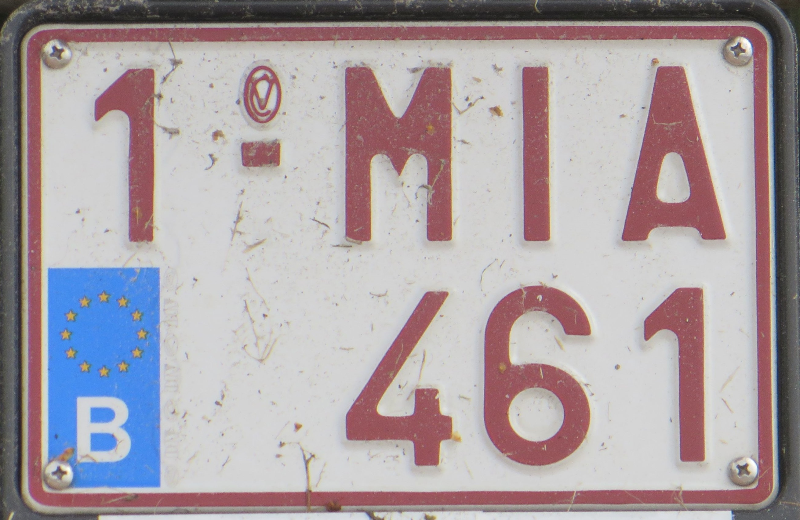 Motorfiets kentekenplaat België